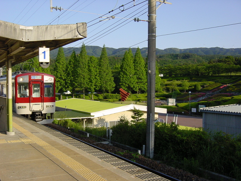 東青山駅 2002/05/26 06:15:12 撮影者:takecolo